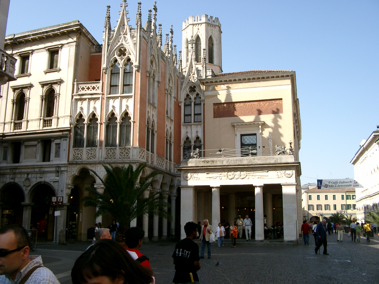 Il Caffè Pedrocchi di Padova Pedrocchi Cafè in Padua